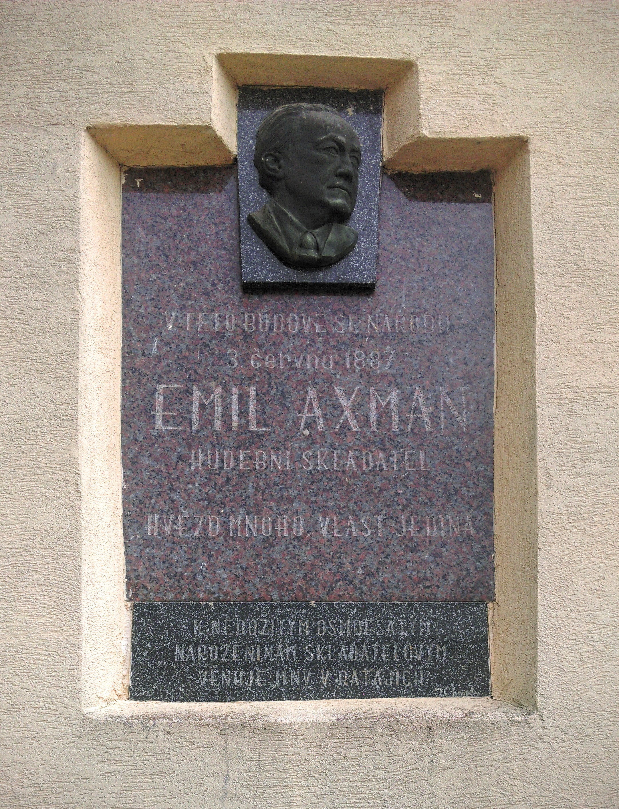 Pamětní deska Emila Axmana na jeho rodném domě - Rataje 31